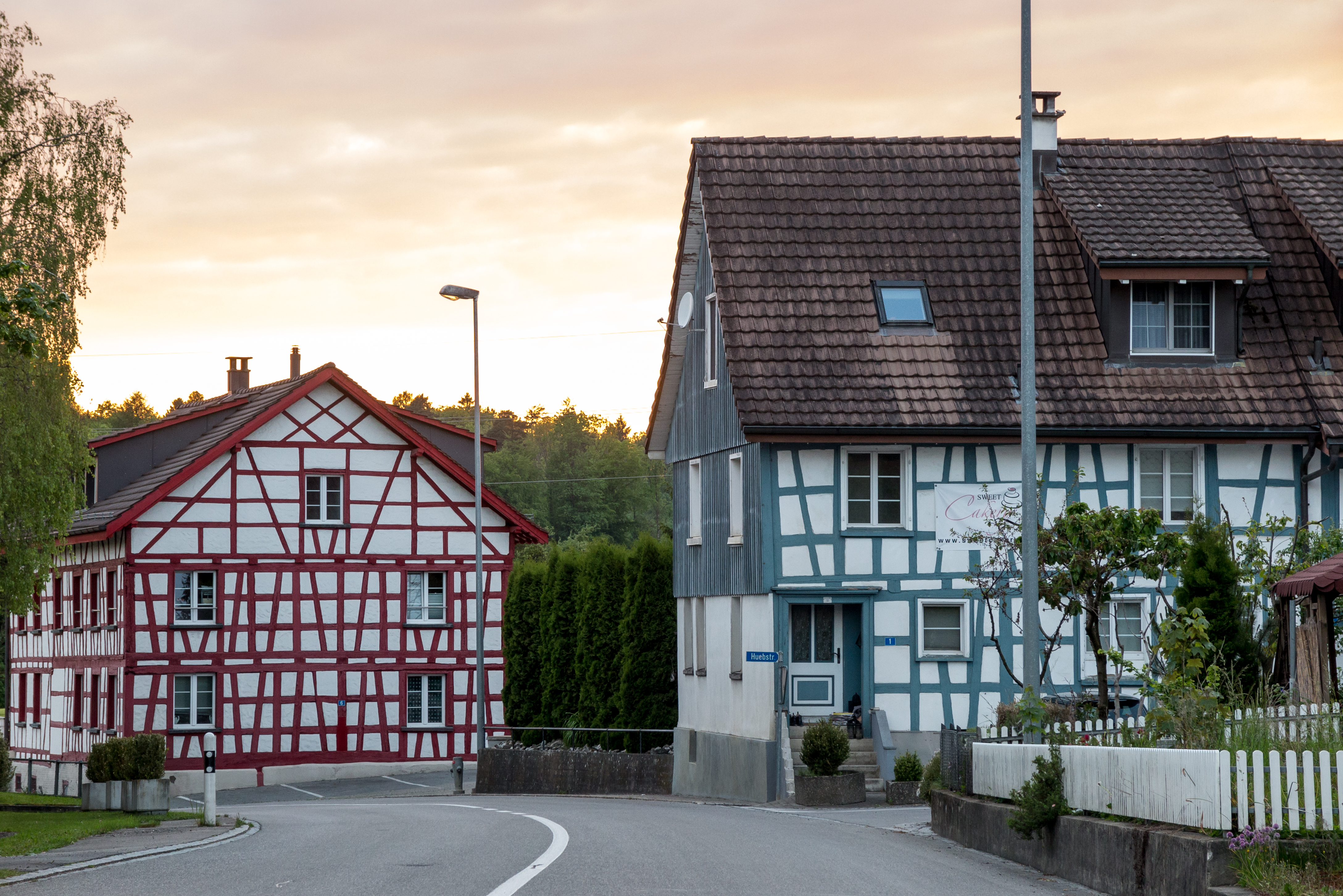 Riegelhäuser Alpenstrasse 6 und Huebstrasse 1 in Neuwilen TG